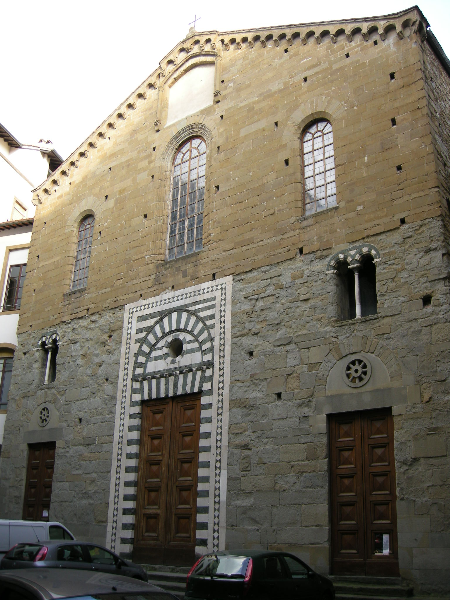 Santo stefano al ponte vecchio, facciata